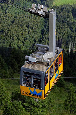 Kronbergbahn (Jakobsbad - Kronberg)